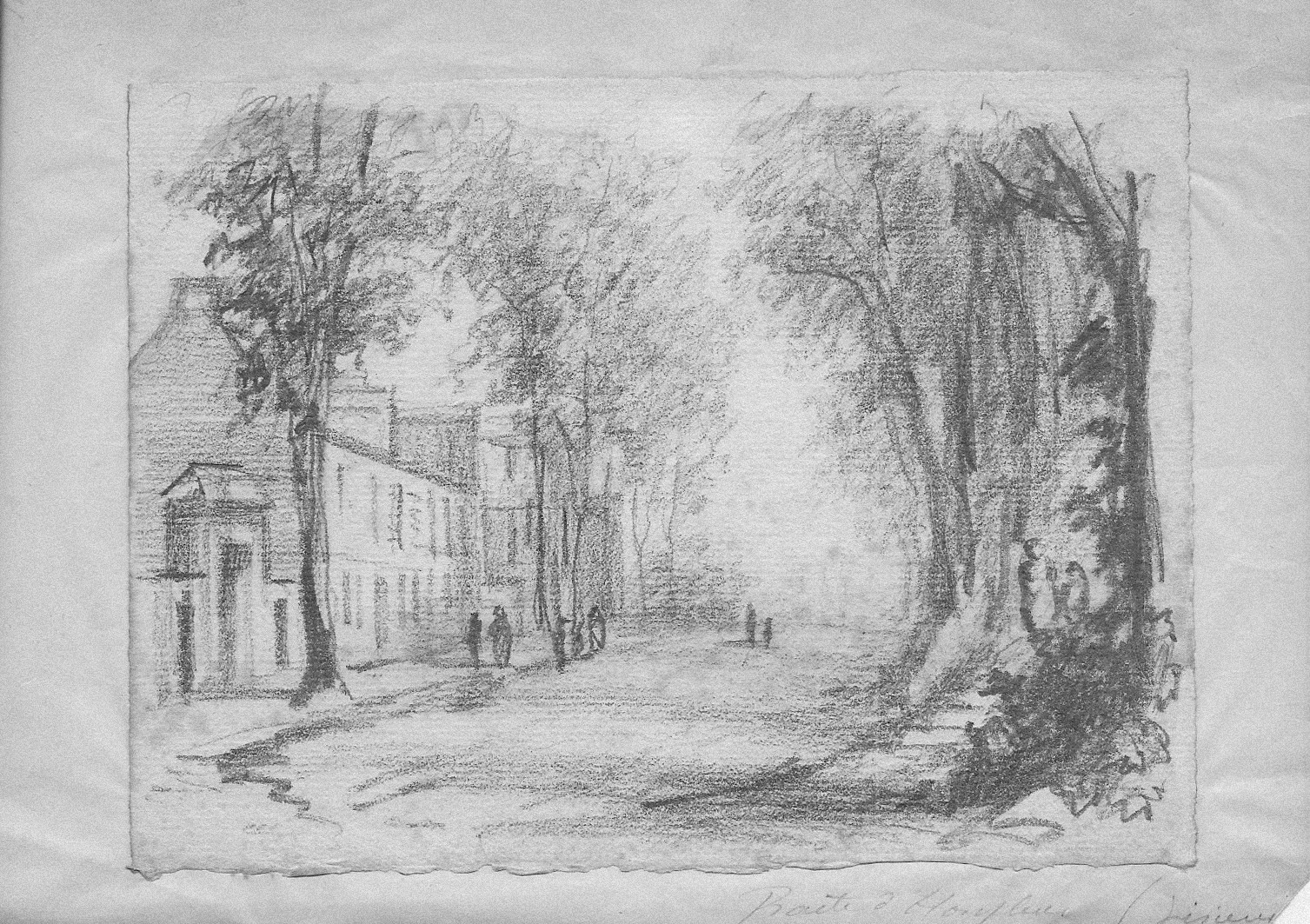 Dessin anonyme XIXème siècle.